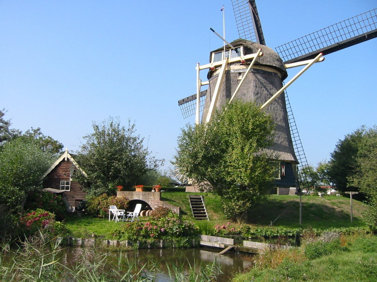 De Zwaan/ Ten-Bruggencatenummer: 00280: Achtkante grondzeiler schuin van achteren gefotografeerd (opmerking: Foto gemaakt in het kader van het project Actualisering Monumentenregister (AMR).)